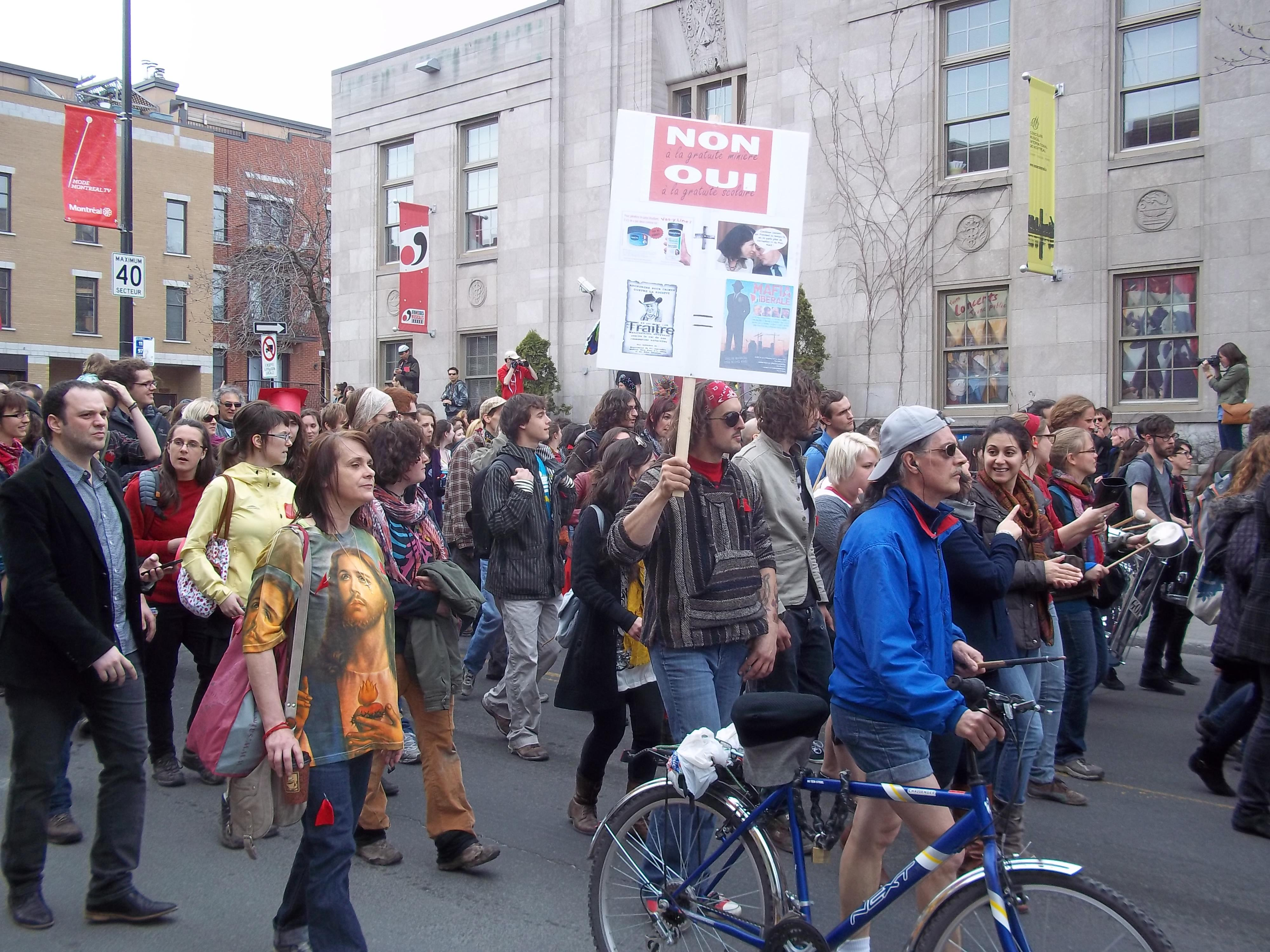 Manifestation du 14 avril 2012 à Montréal